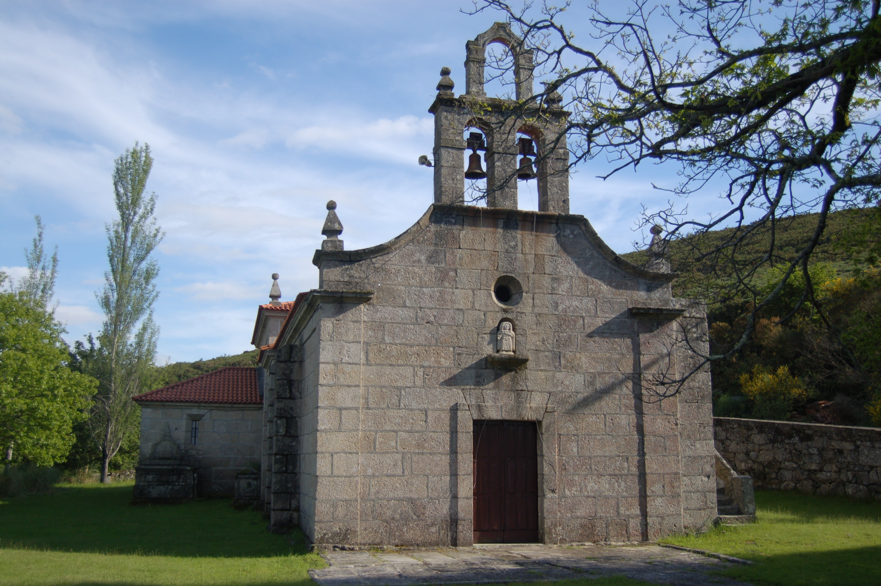 Igrexa parroquial de Santa María das Estacas (Fornelos de Montes)